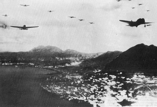 Central under air raid